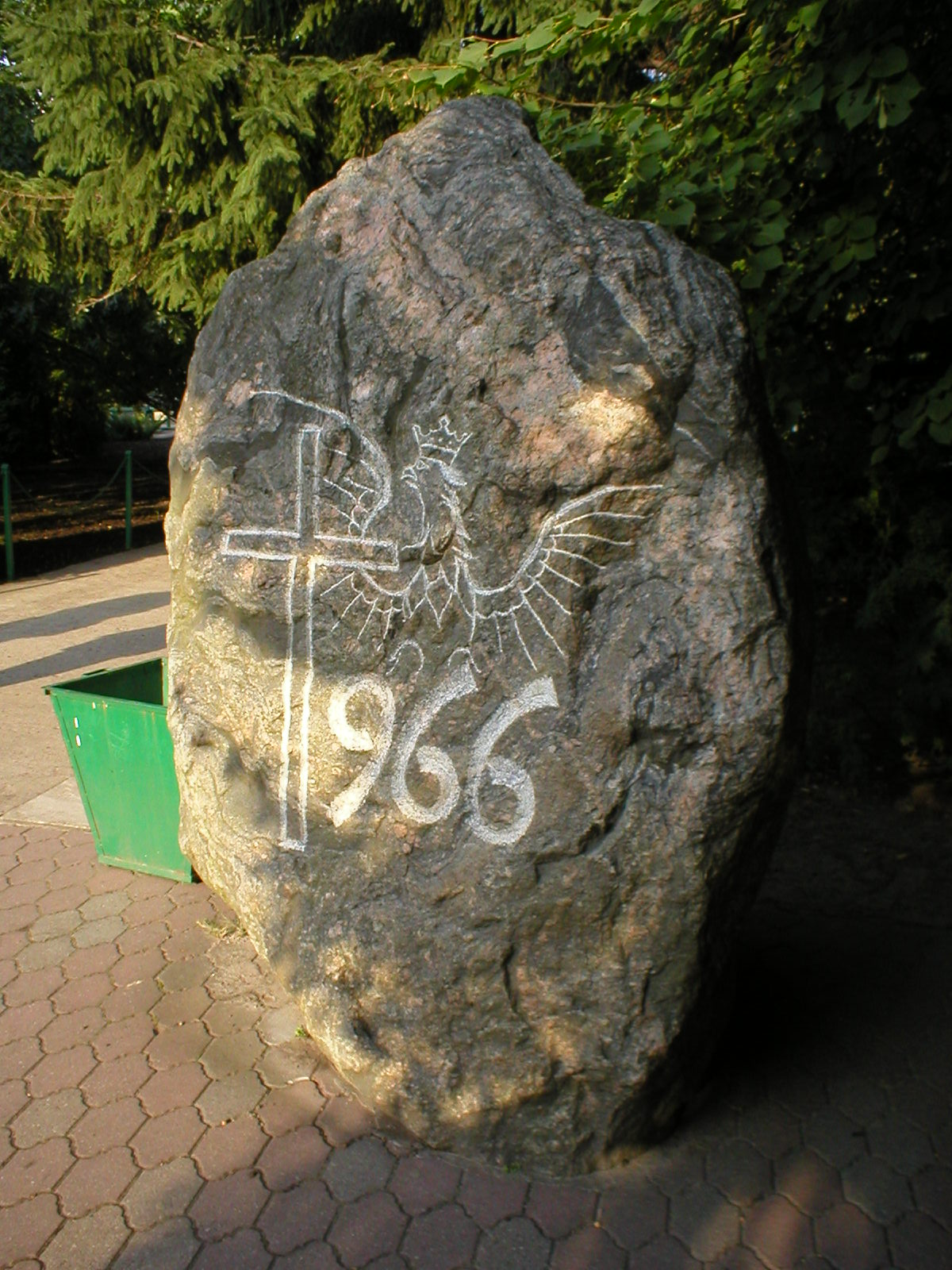 Kamień pamiątkowy z ogrodów przy Bazylice w Licheniu.